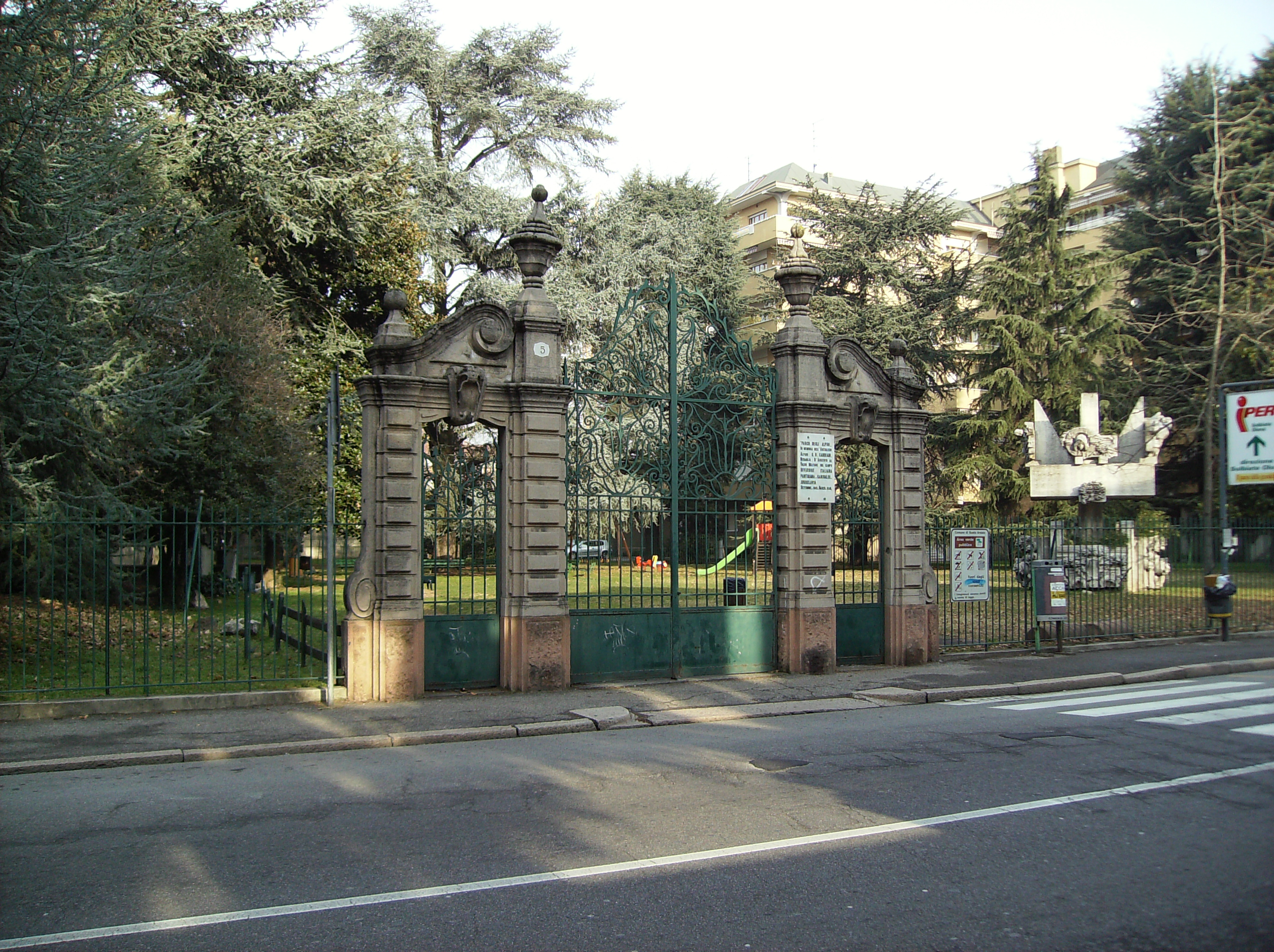 Parco al Liberty (cancello villa Gabardi) - Busto Arsizio